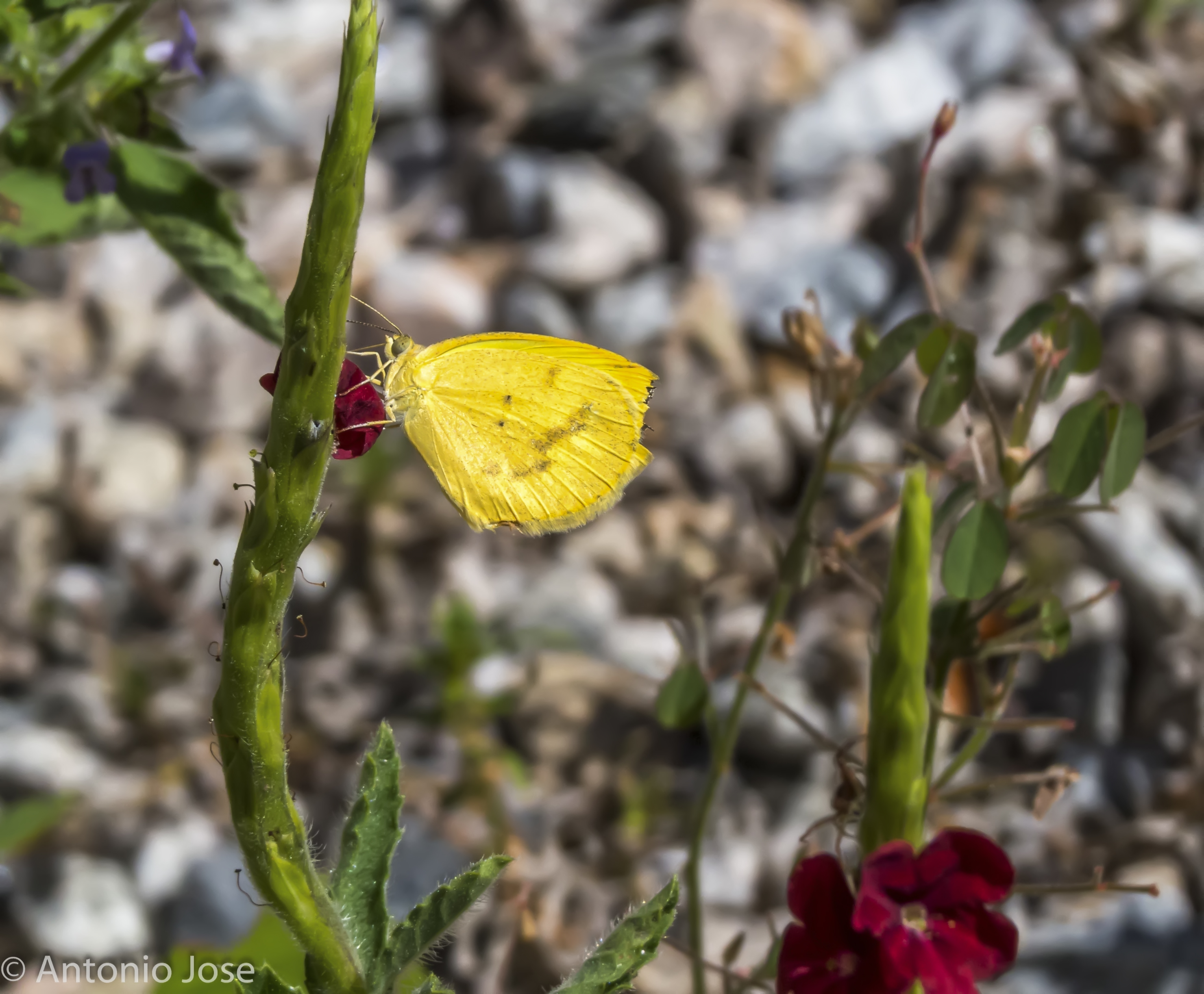 Parque Botânico de Caucaia no Ceará